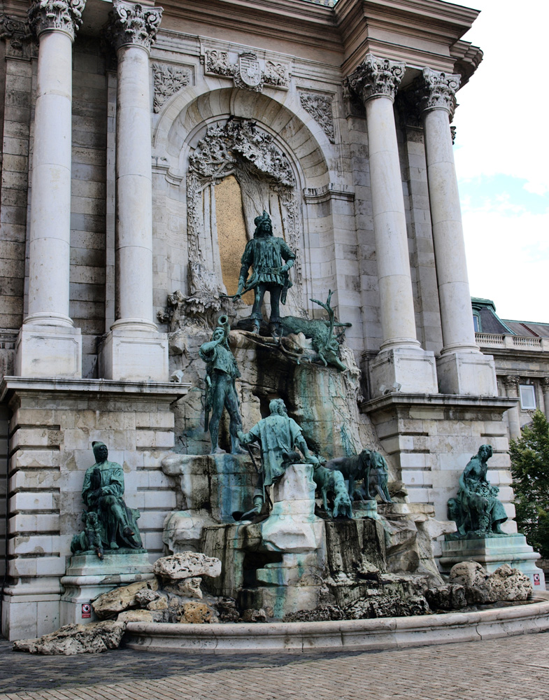 Mátyás forrás, Budapest, budai vár. Stróbl Alajos szobrászművész és Hauszmann Alajos építész alkotása (1904)